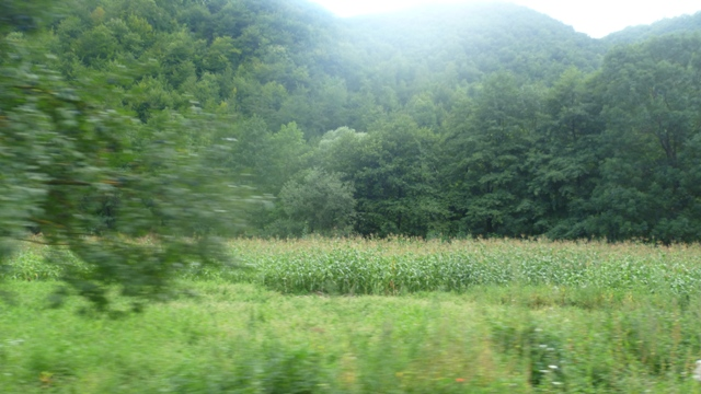 Kukuruzi